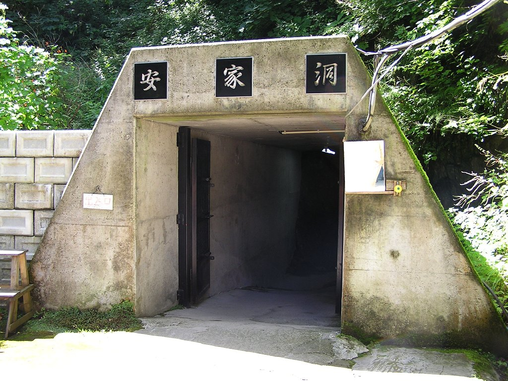 安家洞入口